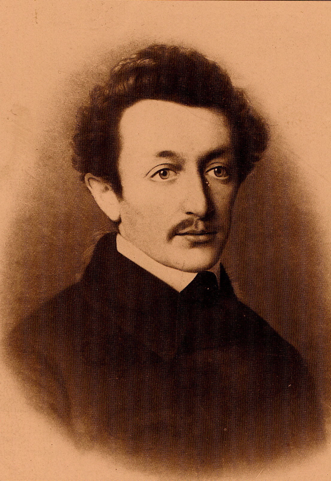 Моисей Хесс